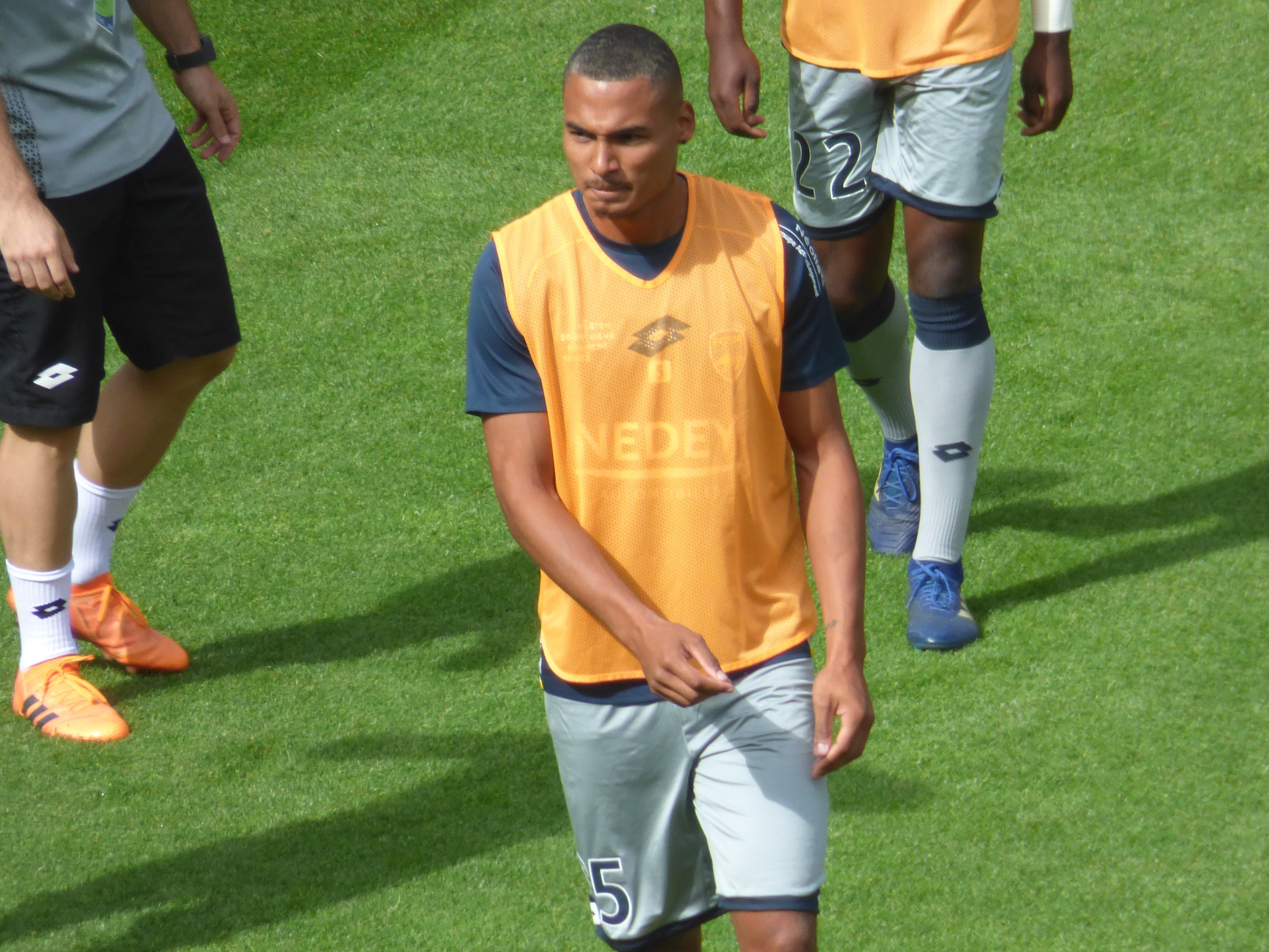 Olivier Verdon avant le match Lens / Sochaux, comptant pour la septième journée du championnat de France de football de Ligue 2, le 15 septembre 2018.